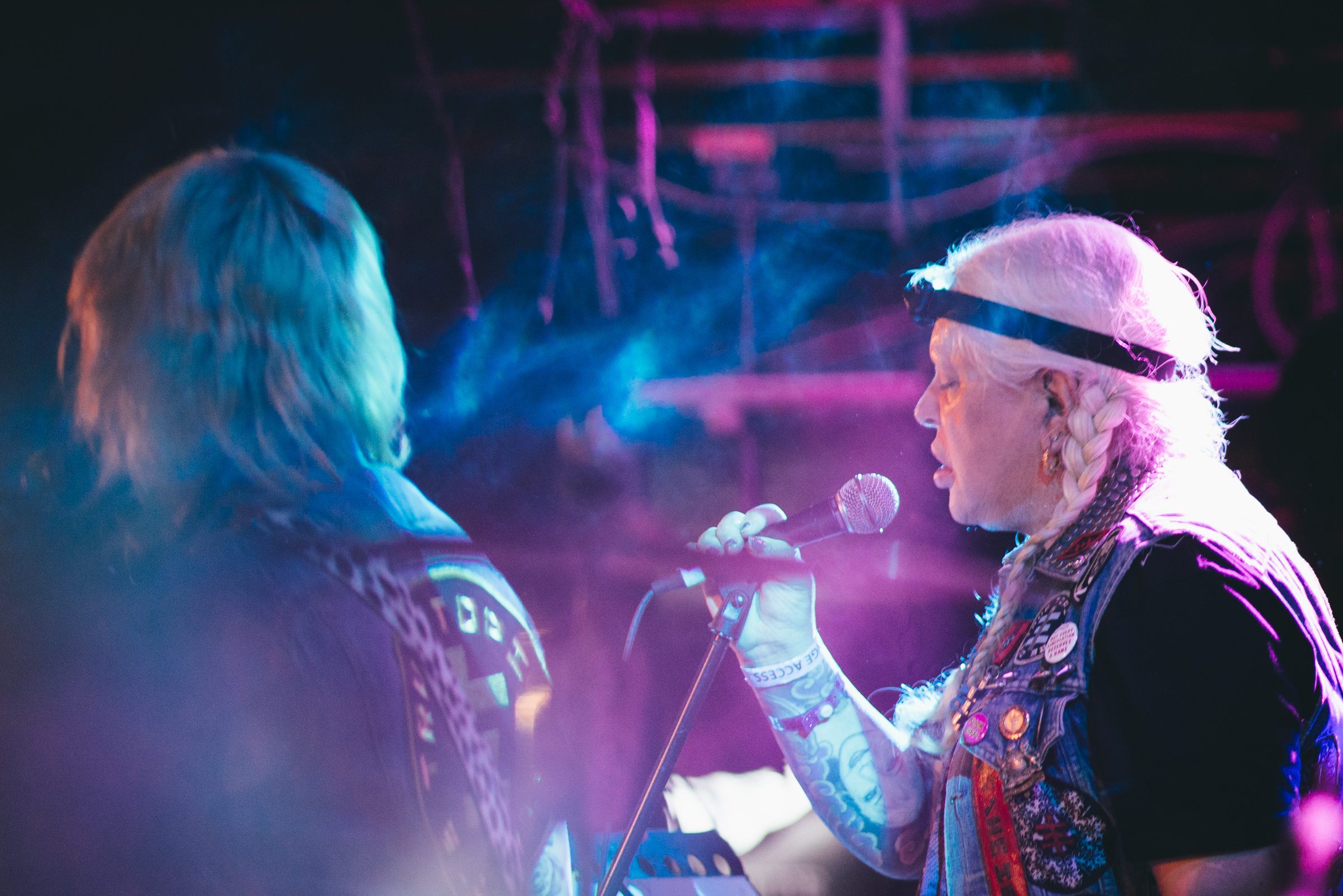 Sled Island, Calgary Canada 2016